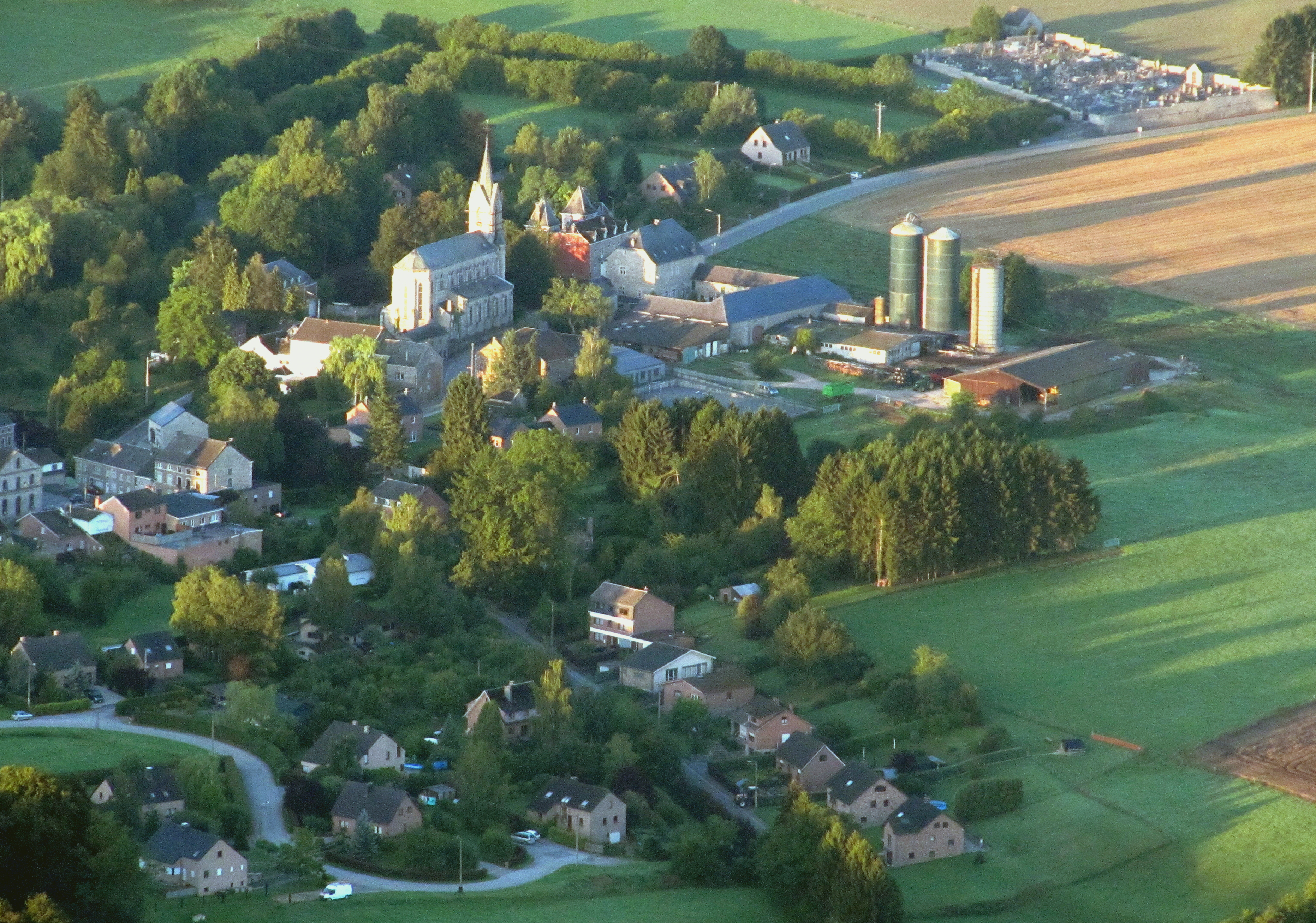 FERRIERES vu d'en haut